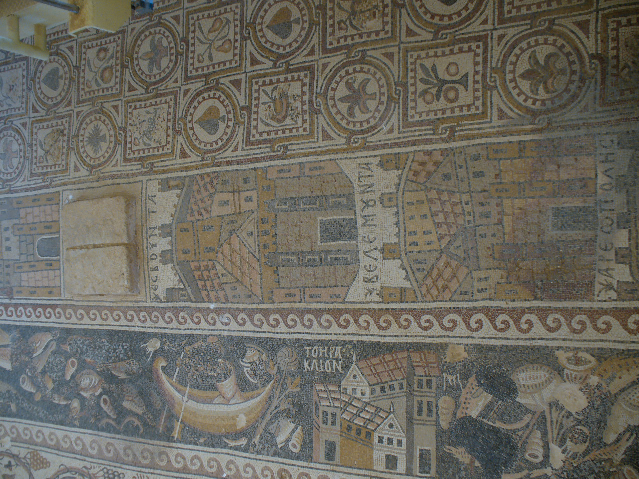 Eglise Saint-Etienne, nef centrale, détail du pavement mosaïqué Umm ar-Rasas